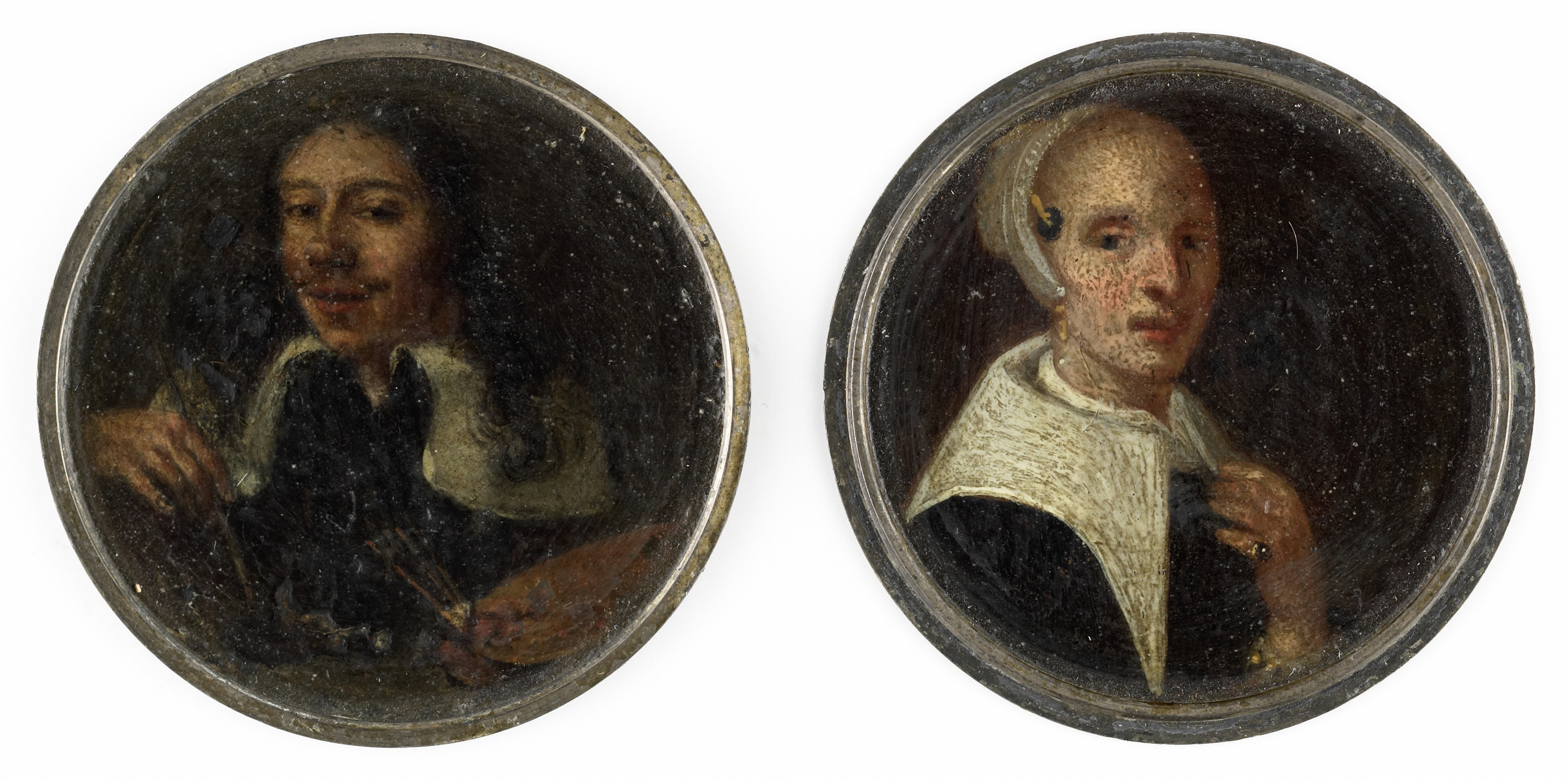 Zelfportret van Johann Philip Lembke (1631-1713) en portret van zijn vrouw. Beiden in buste, de vrouw naar rechts, de man naar links met palet en penselen in de hand. Geschilderd op de binnenzijden van een zilveren schroefdaalder uit 1632. Onderdeel van de collectie portretminiaturen. Collection: miniaturen; munten, penningen en draagtekens